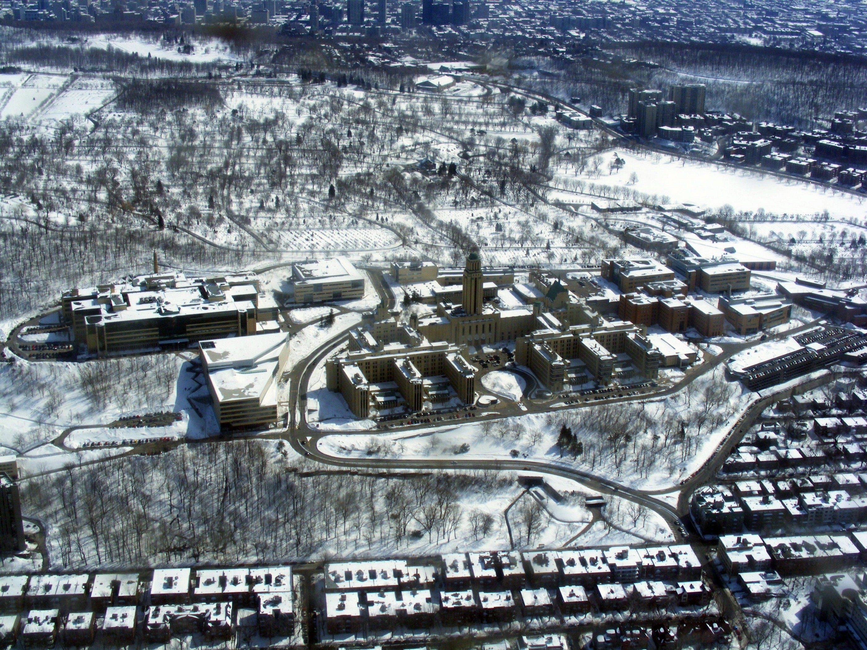 On voit aussi à gauche l'école Polytechnique. L'avion était un Cessna 172 de Dorval Aviation